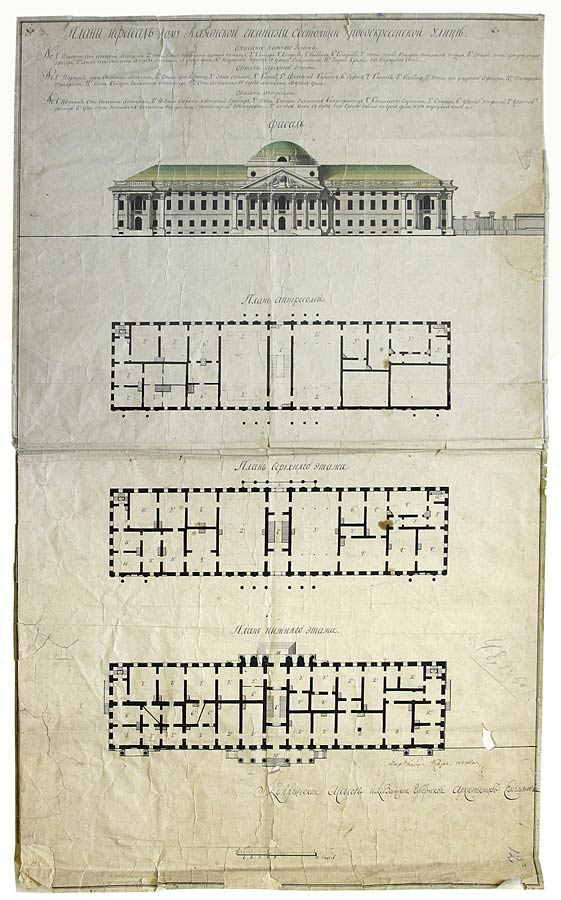 Емельянов Ф. Е. План и фасад здания Казанской гимназии по Воскресенской улице. Казань. Первая половина XIX века. Бумага, акварель, тушь, перо.